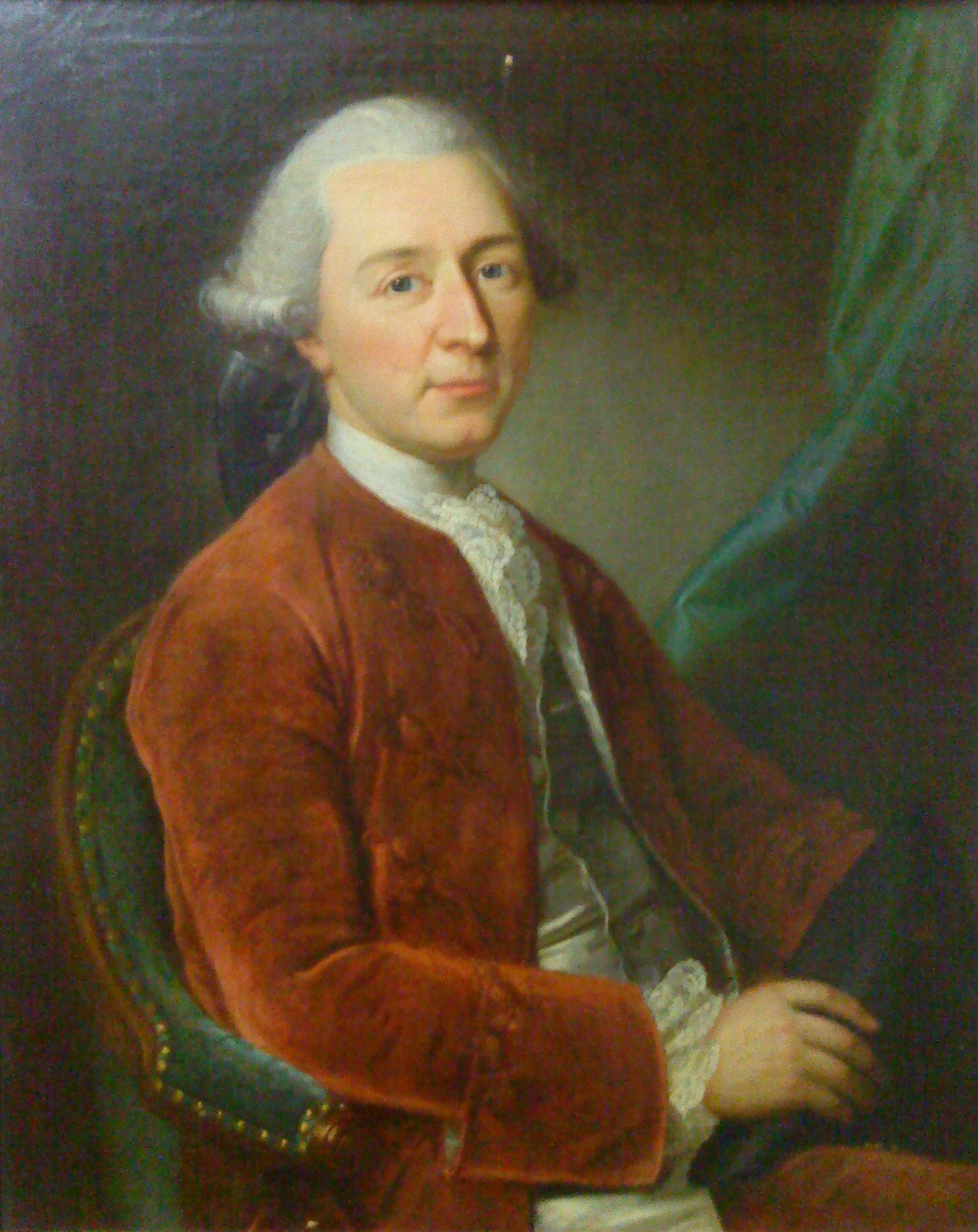 Bildnis Albrecht Steiger (1723-1793), Gerichtssubstitut, Kastlan von Zweisimmen, erster trésorier der Grande Sociéte in Bern.